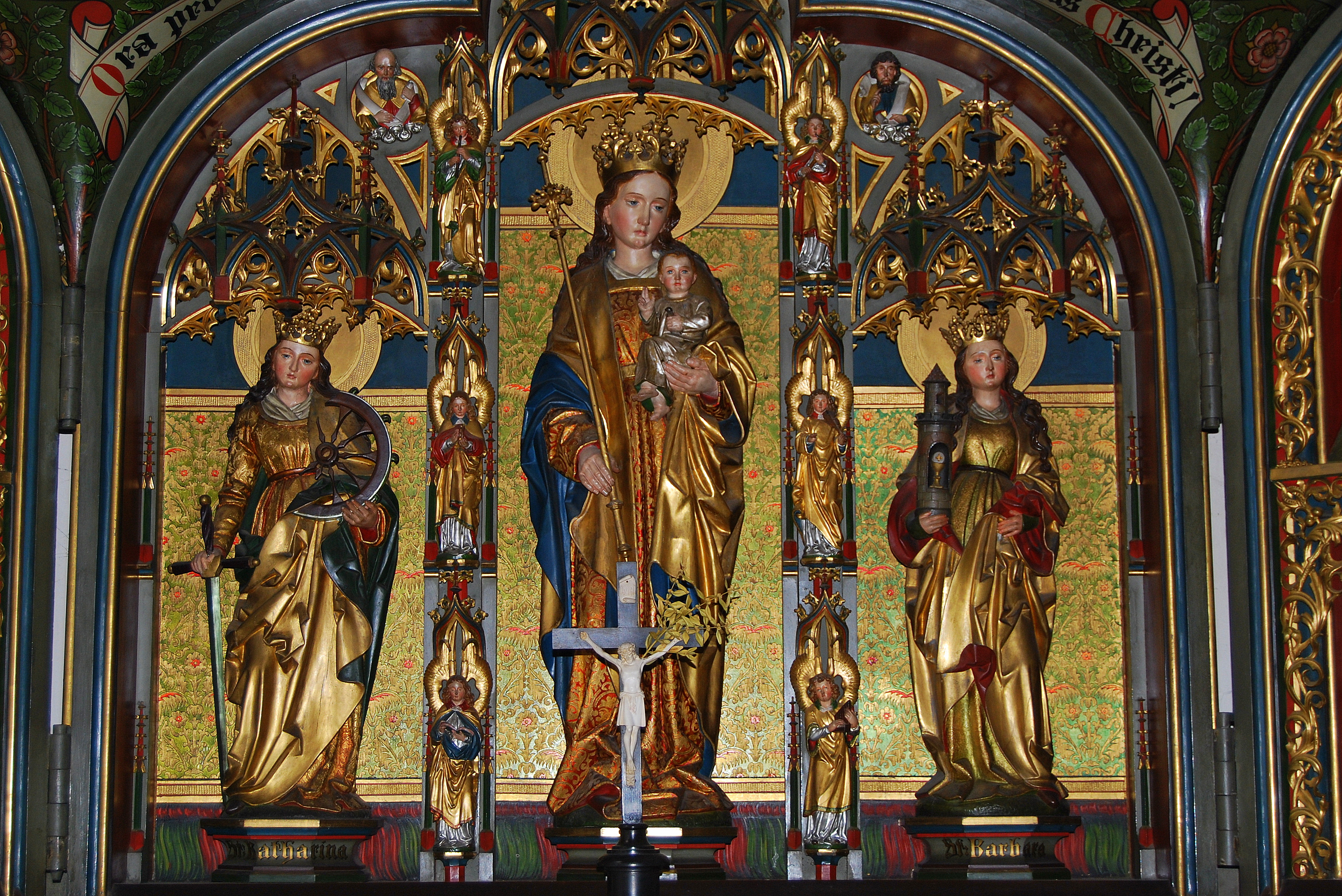 Heilig Kruiskerk (Rheingauer Dom) Geisenheim Hoofdaltaar